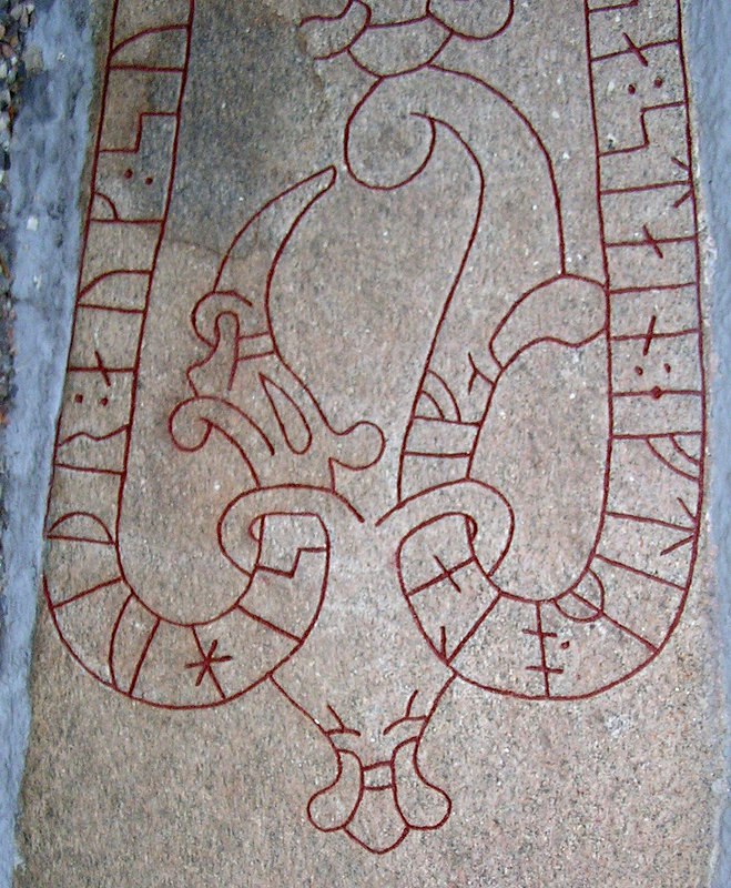 Sö276